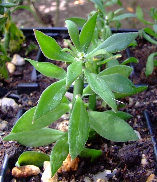 Pereskiopsis spathulata Mexico - Guadalajara, Jalisco.